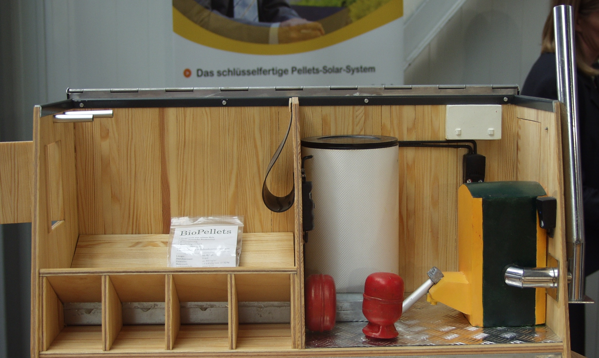 Modell einer Pellet-Zentralheizung mit Pelletlager und Warmwasserspeicher